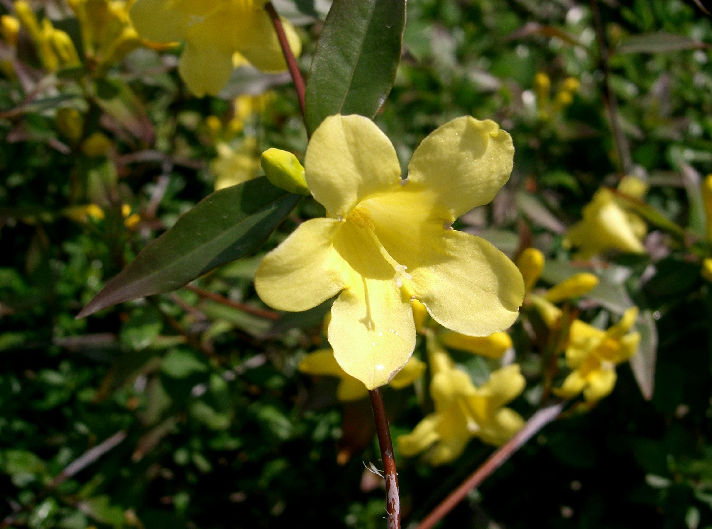 Gelsemium sempervirens